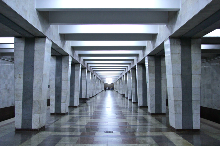 Samara Metro (Самарский метрополитен)